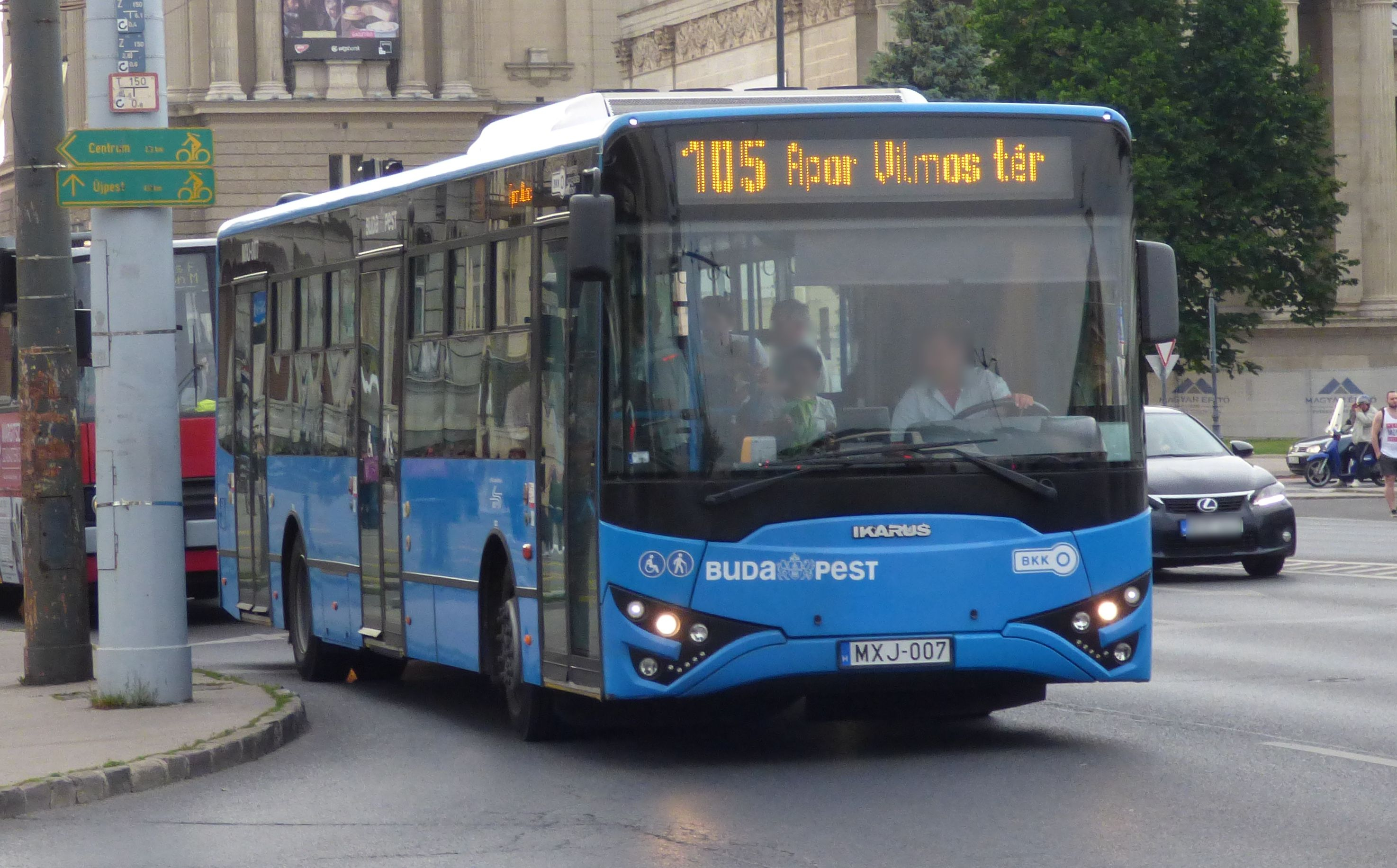 105-ös jelzésű Ikarus V127-es busz a Hősök terénél (frsz. MXJ-007)